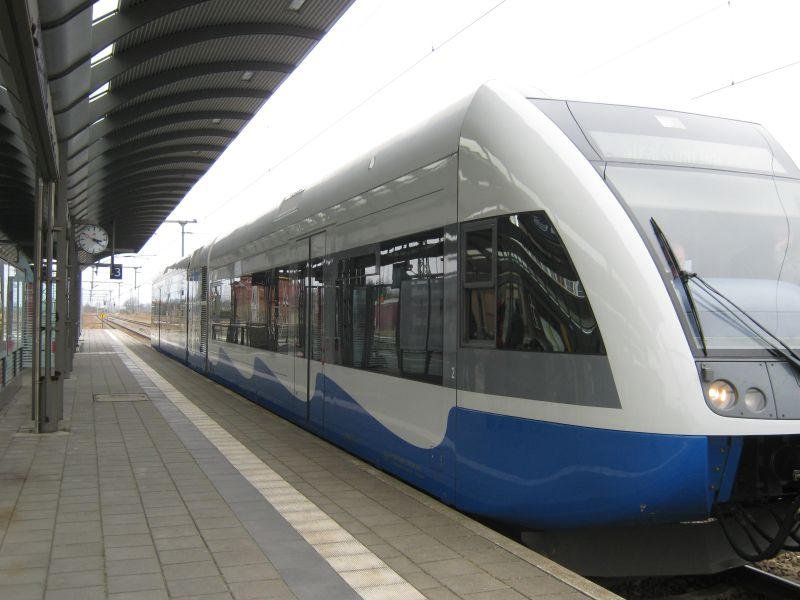 Regionalzug der Usedomer Bäderbahn zwischen Barth und Velgast, am Haltepunkt Velgast